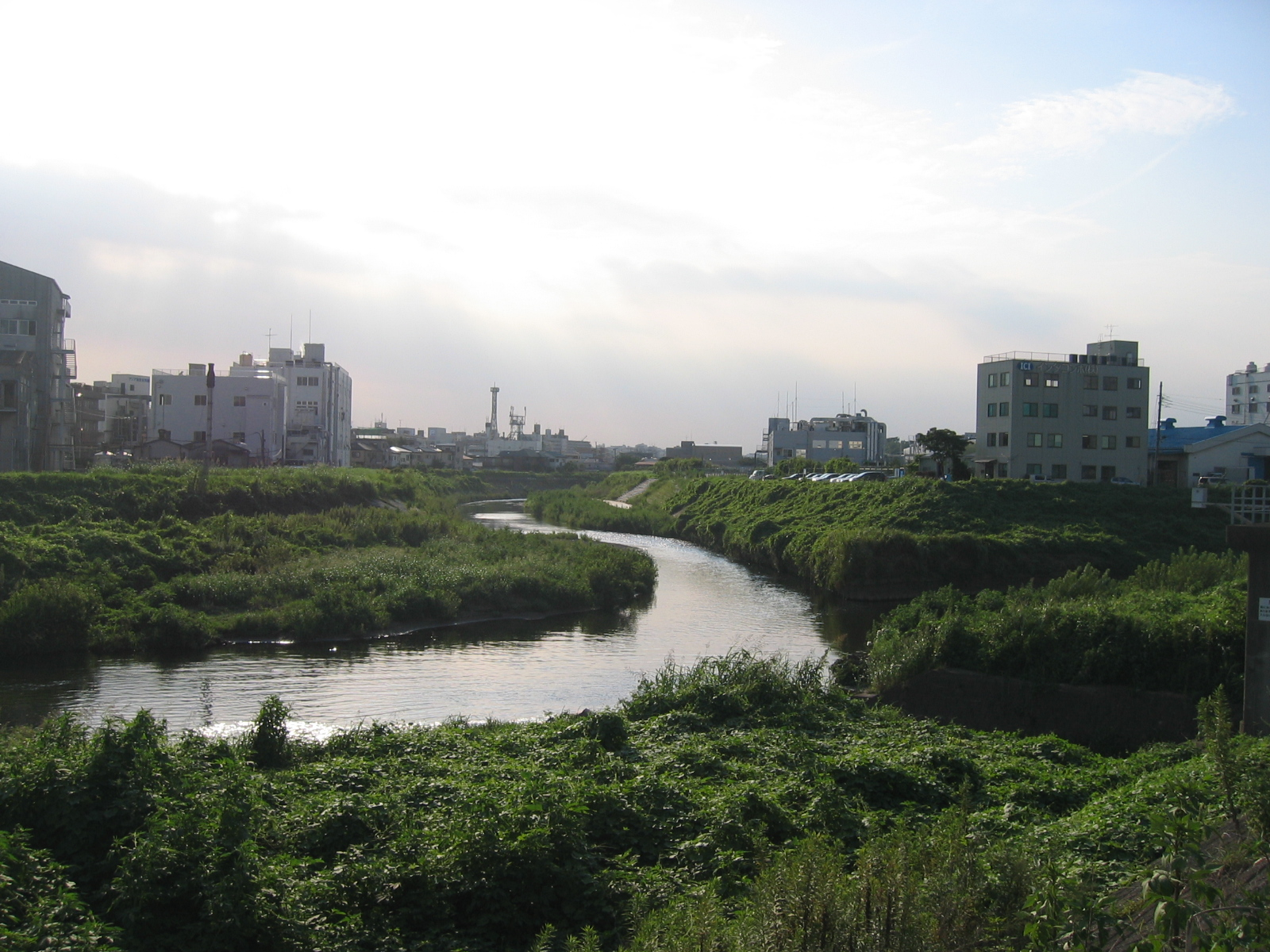 2006年8月21日、利用者自身の撮影。